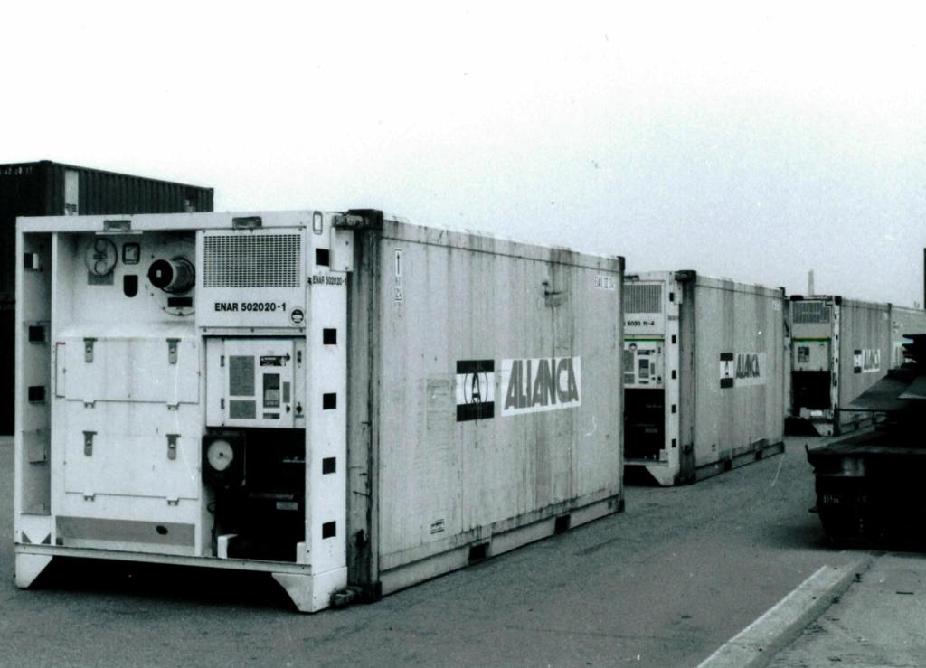 Porthole Container mit Clip-On